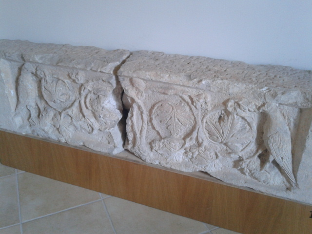 Architrave della chiesa crollata di San Nicola